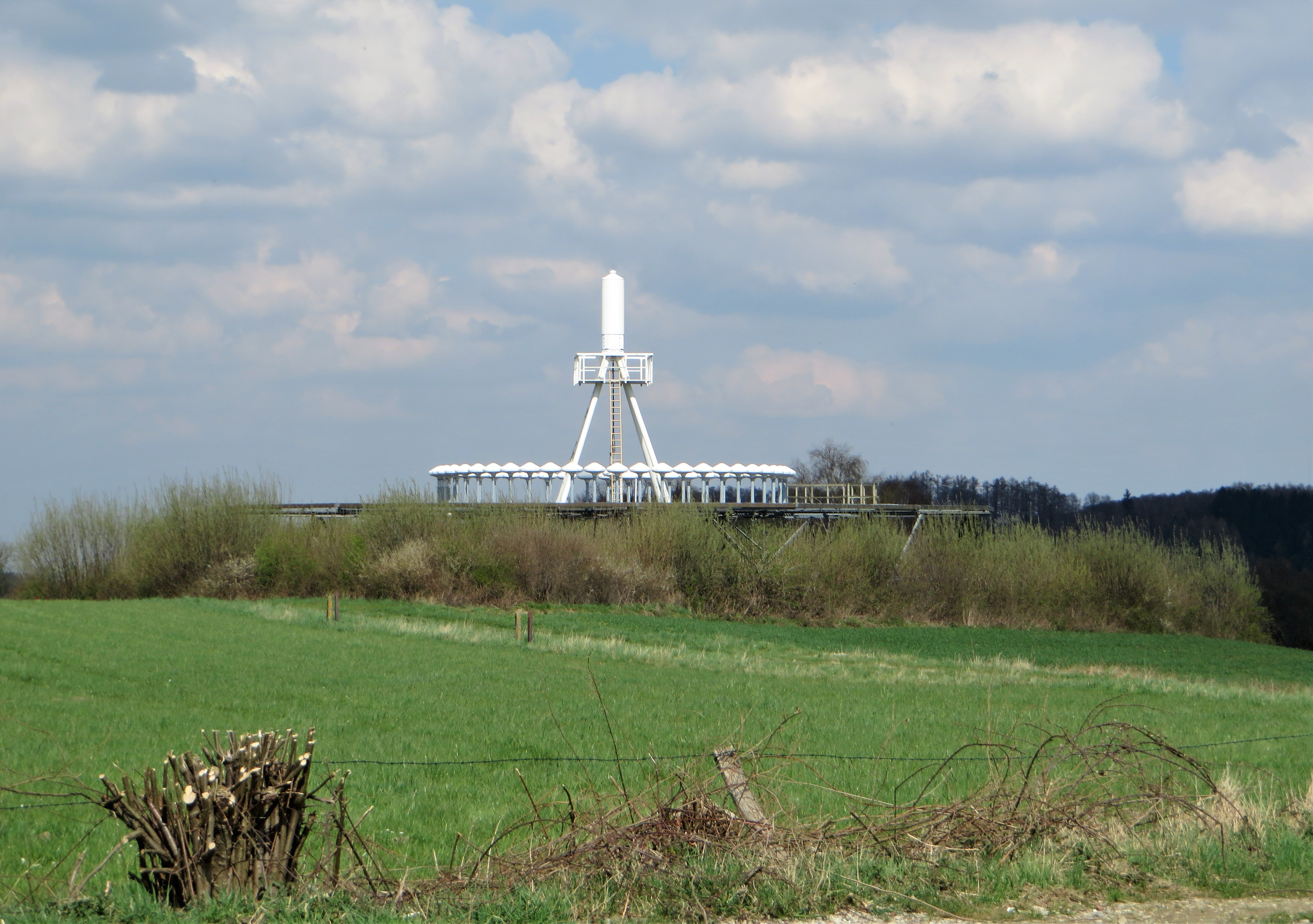 Drehfunkfeuer BAM „Barmen“ am Höhbusch (255 m) im Hattinger Stadtteil Oberelfringhausen. Typ DVORTAC, Frequenz/Kanal 113.60 CH 83x.